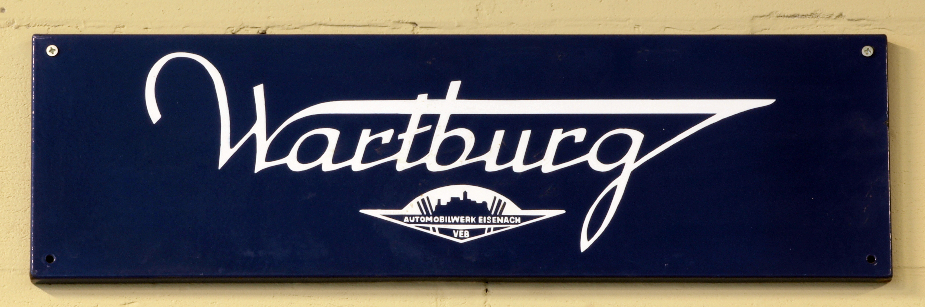 Den Hartogh Ford Museum.